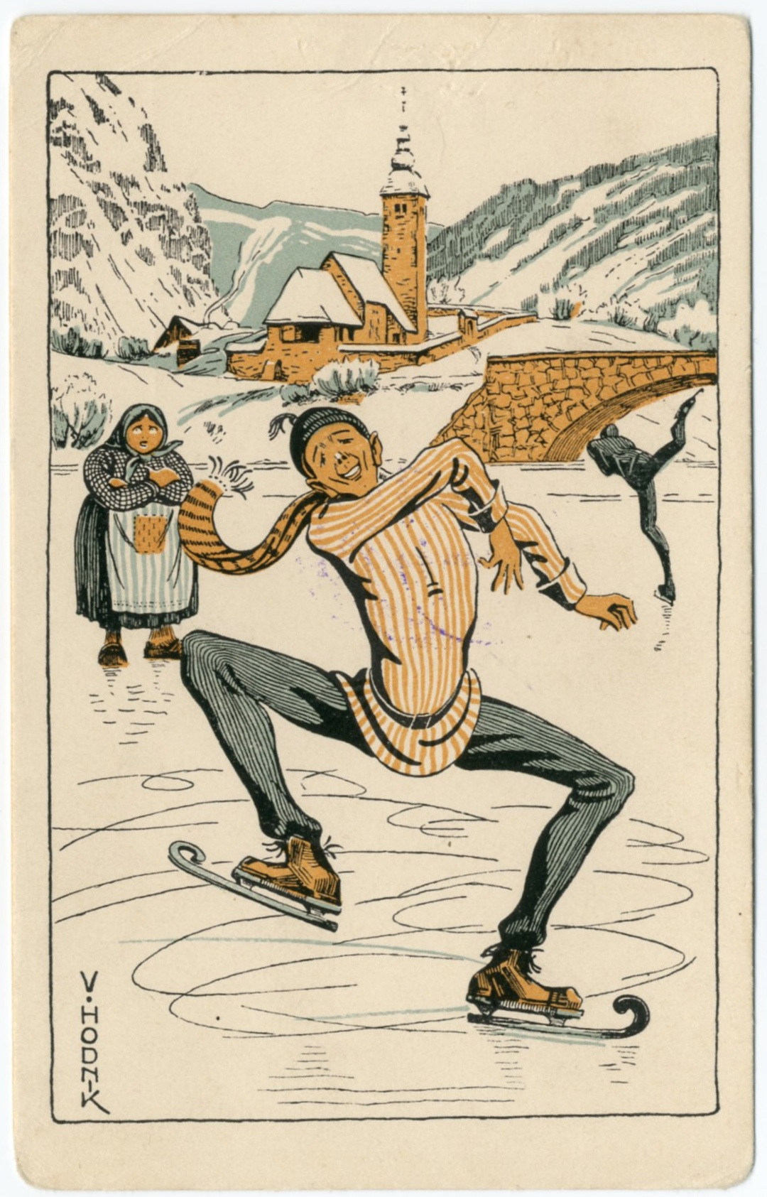 Futurizem poklicnih